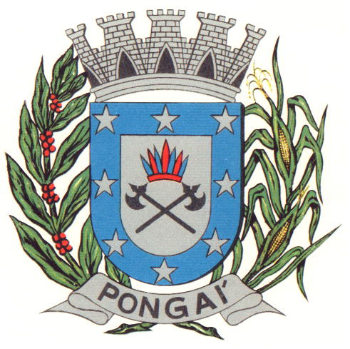 Bandeira do município de Pongaí - SP - Brasil.